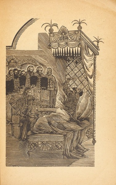 А. Кравченко. Иллюстрация к книге Шторм, Г. Ход слона. [Повесть] / гравюры на дереве Алексея Кравченко. М.; Л.: Государственное издательство, 1930. 79 с.: ил. 19,5 х 13,5 см.